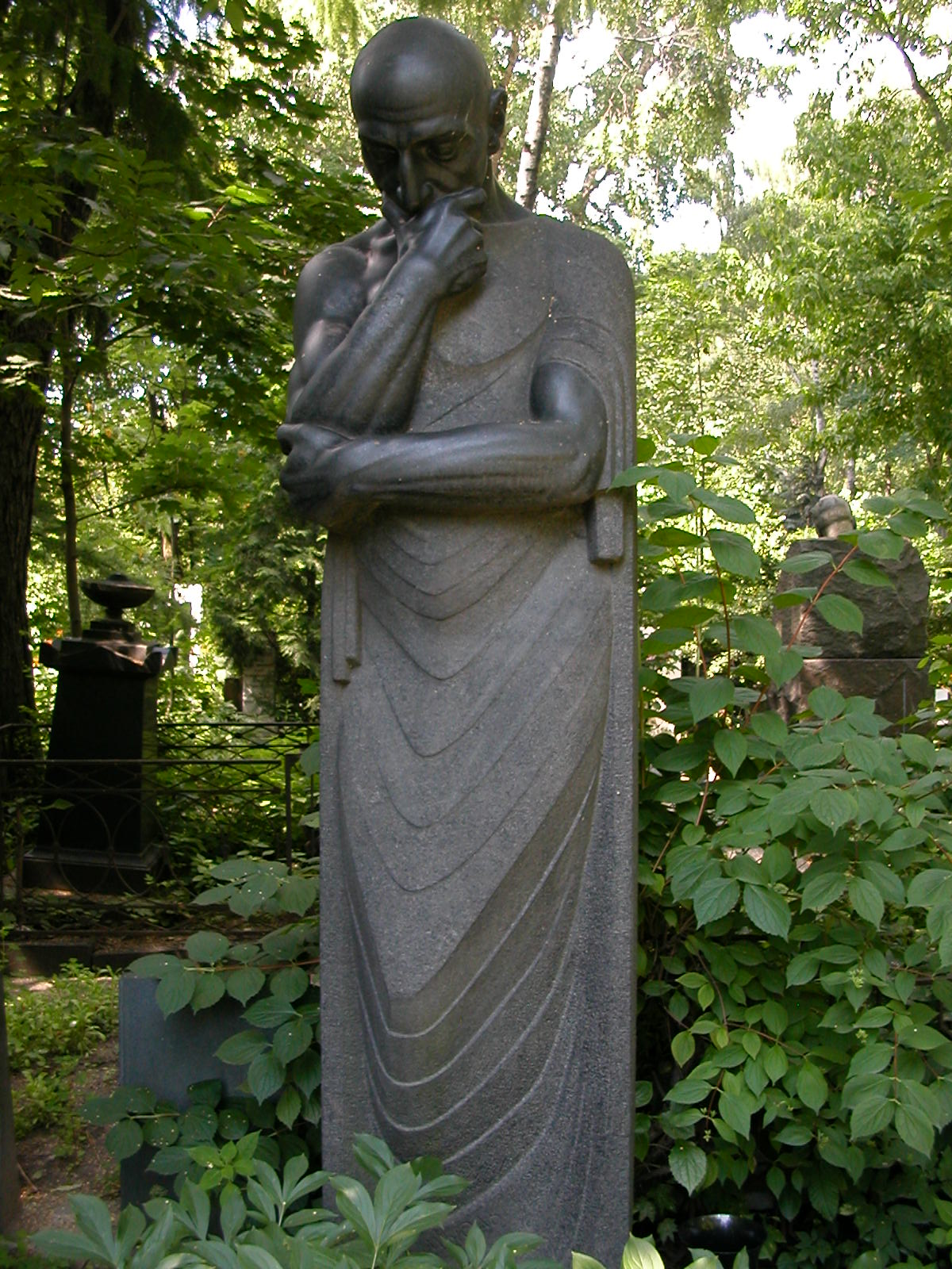 Могила скульптора Сергея Меркурова на Новодевичьем кладбище Москвы. Символическая фигура, «Мысль», Гоббро, порфир. 1911—13, установлена на могиле автора в 1956 году.